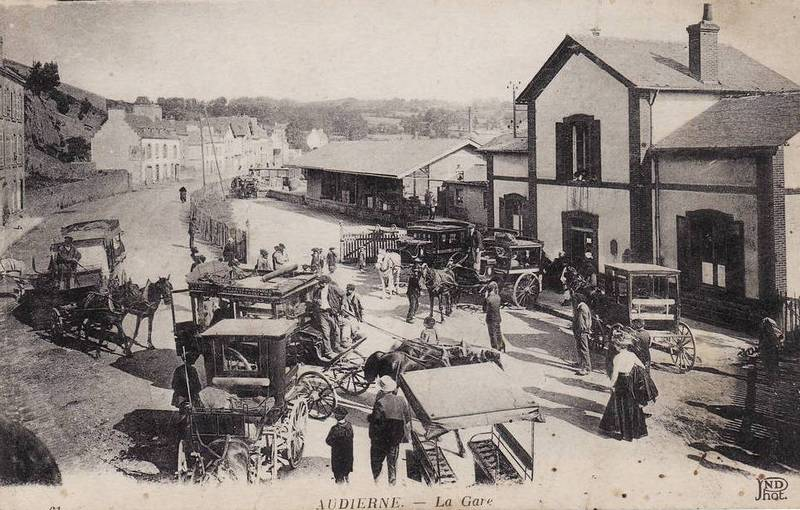 La gare d'Audierne (chemins de fer départementaux du Finistère)